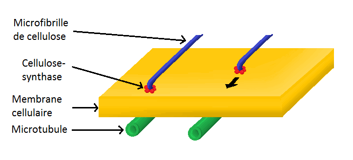 Rosettes de cellulose synthases synthétisant des microfibrilles de cellulose parallèlement aux microtubules.